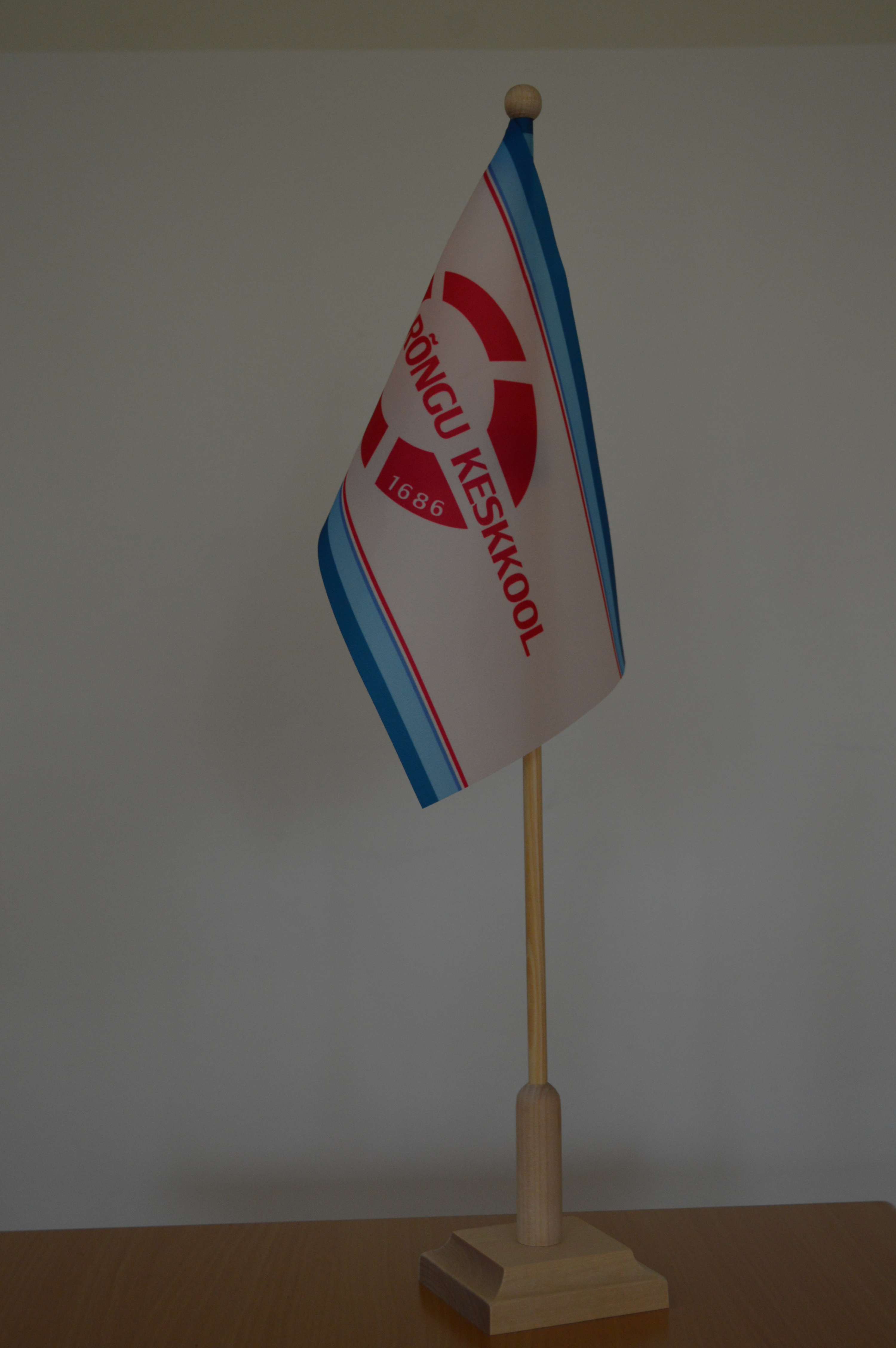 Rõngu Keskooli lipp